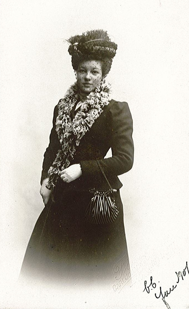 portrett, kvinne, sangerinne, stående knefigur, kåpe, hatt, slør.